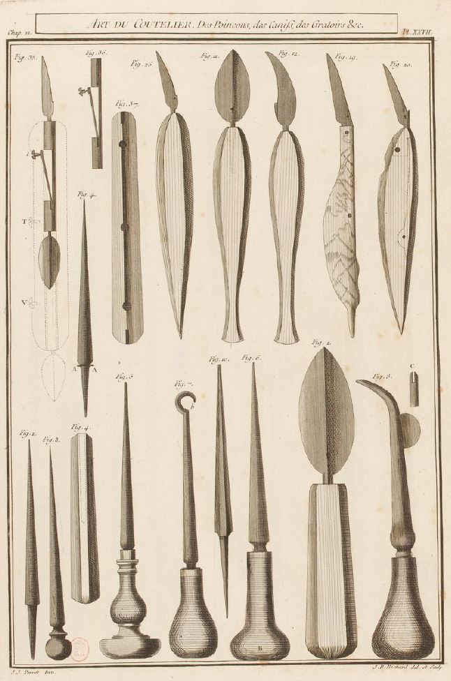 Planche de l'ouvrage de Jean-Jacques Perret (1730-1784), L'art du coutelier, première partie (1771) - Reproduction de la planche 27